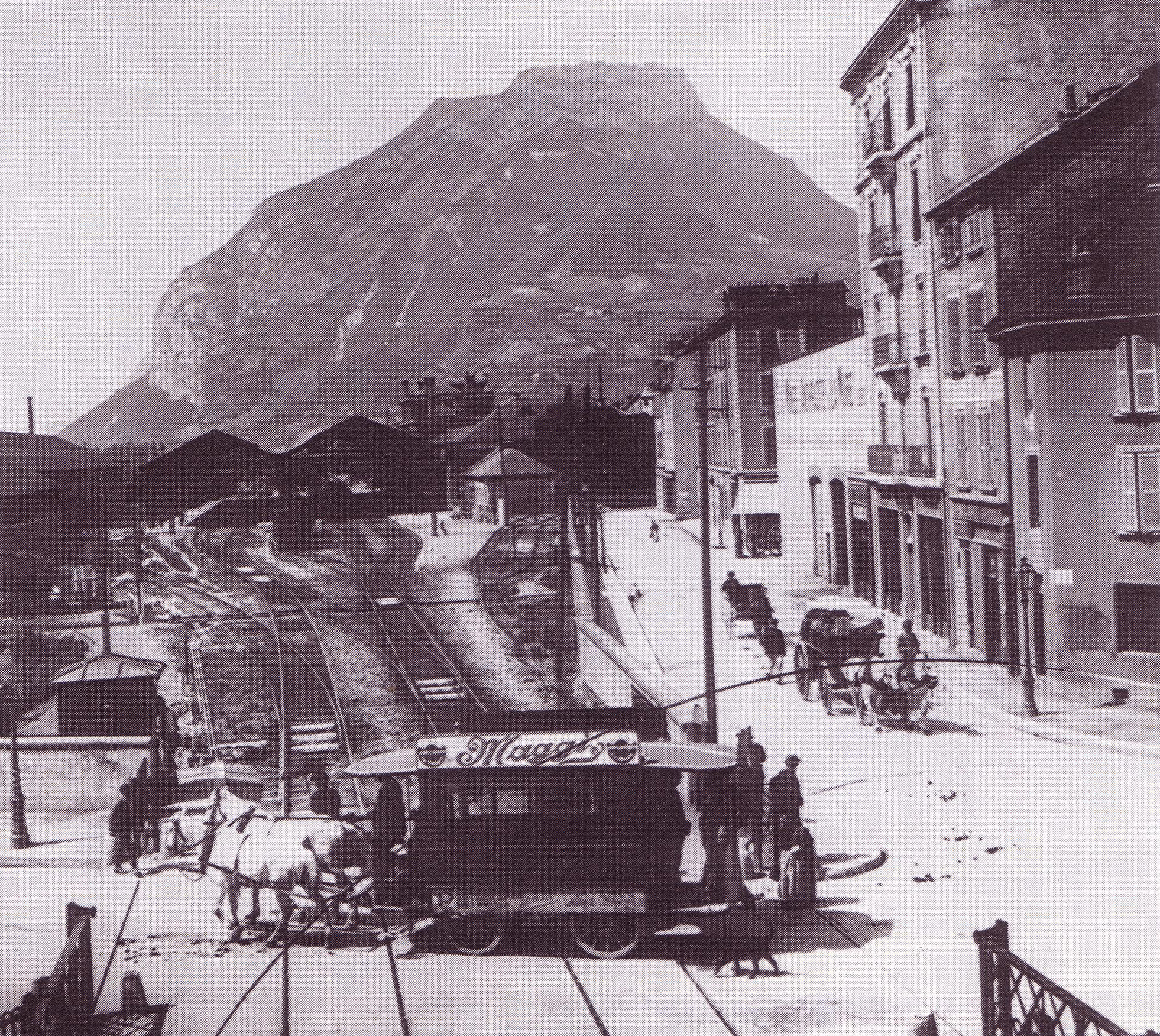 Un car Rippert traversant la voie du PLM au niveau du passage à niveau du Cours Berriat à Grenoble